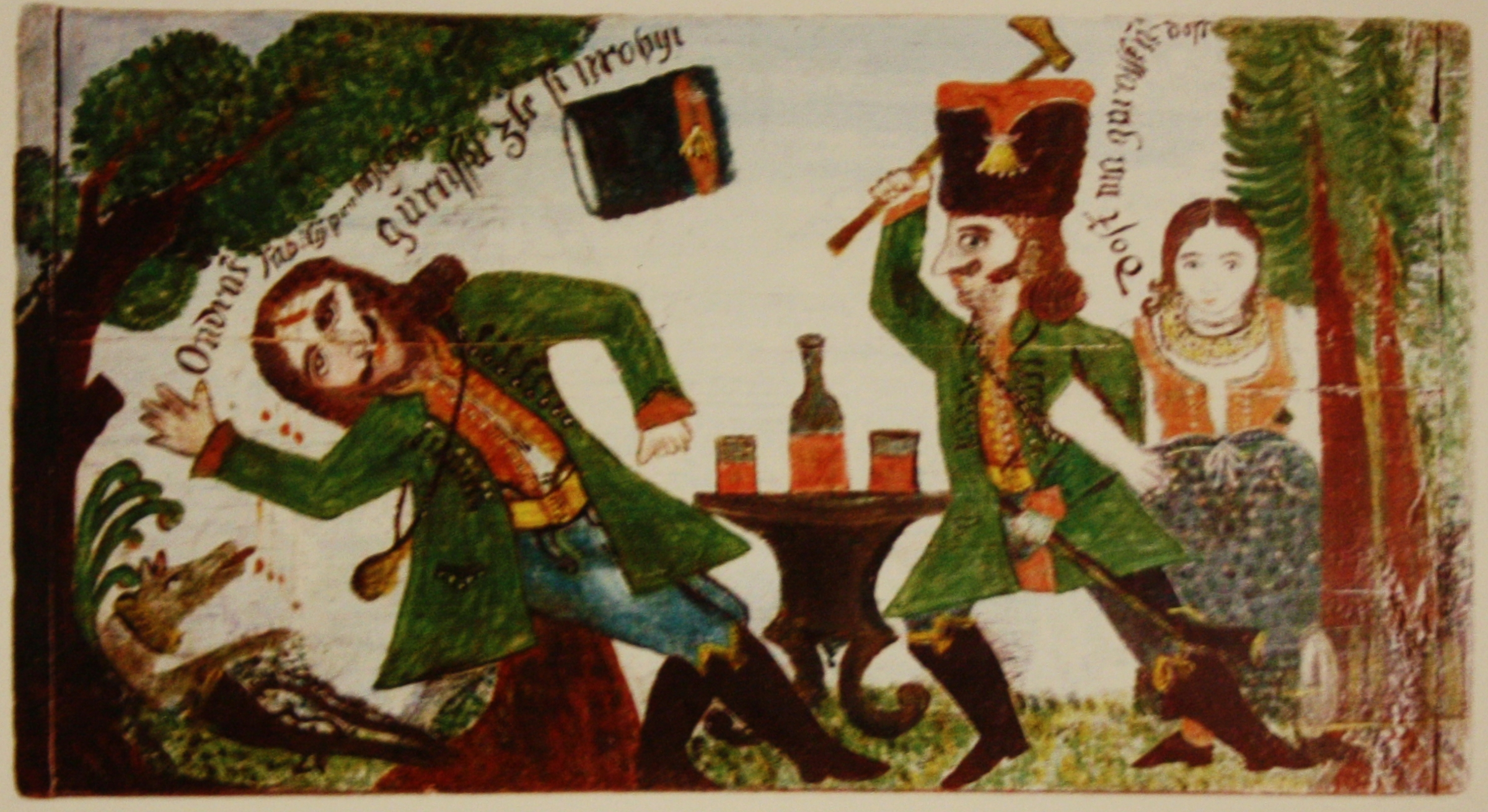 Národopisné muzeum - Musaion: Zabití Ondráše Jurášem, olej na dřevě, konec 18. století (muzeum Ślązska Ćieszyńskiego)